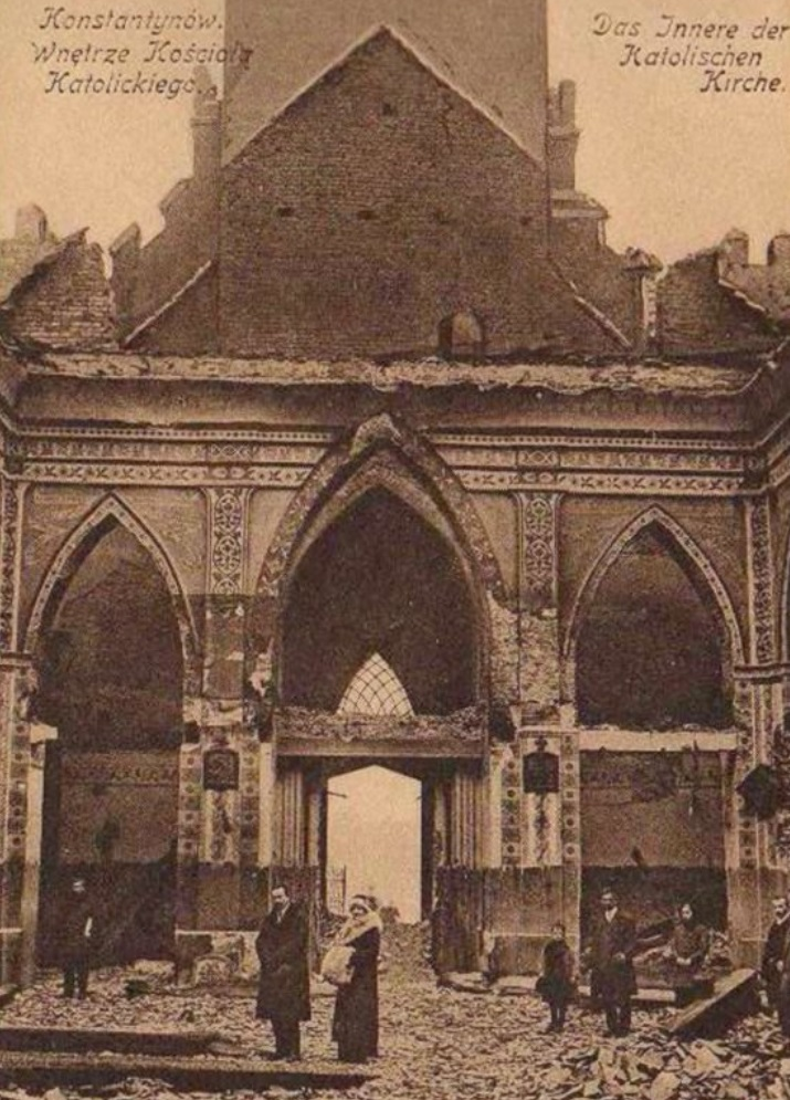 Wnętrze, zniszczenia 1914